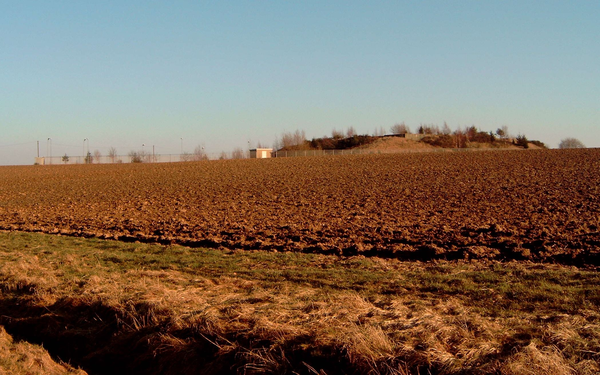 Ehemaliger Bunker auf dem Goßberg